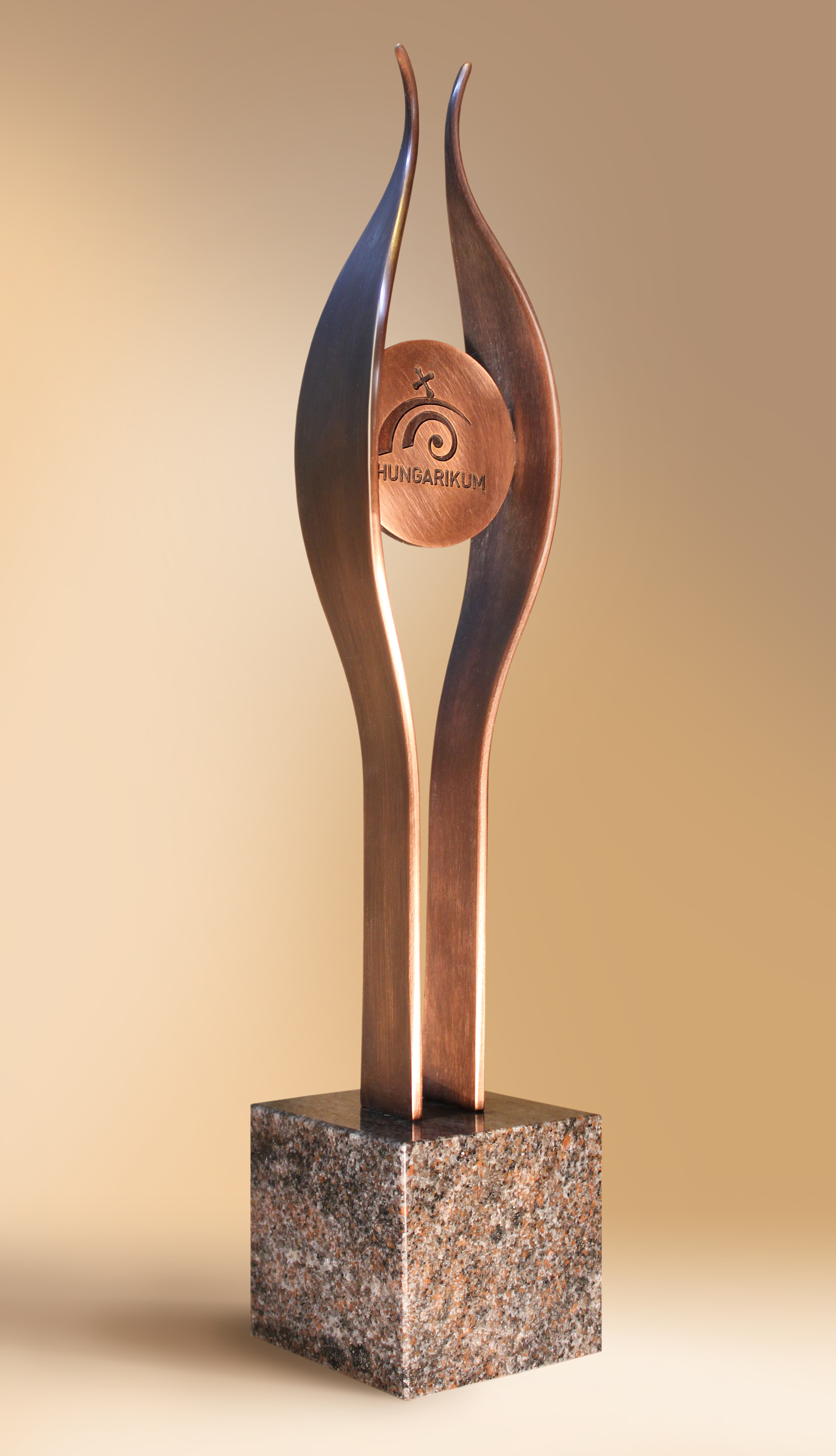 Hungarikum dij